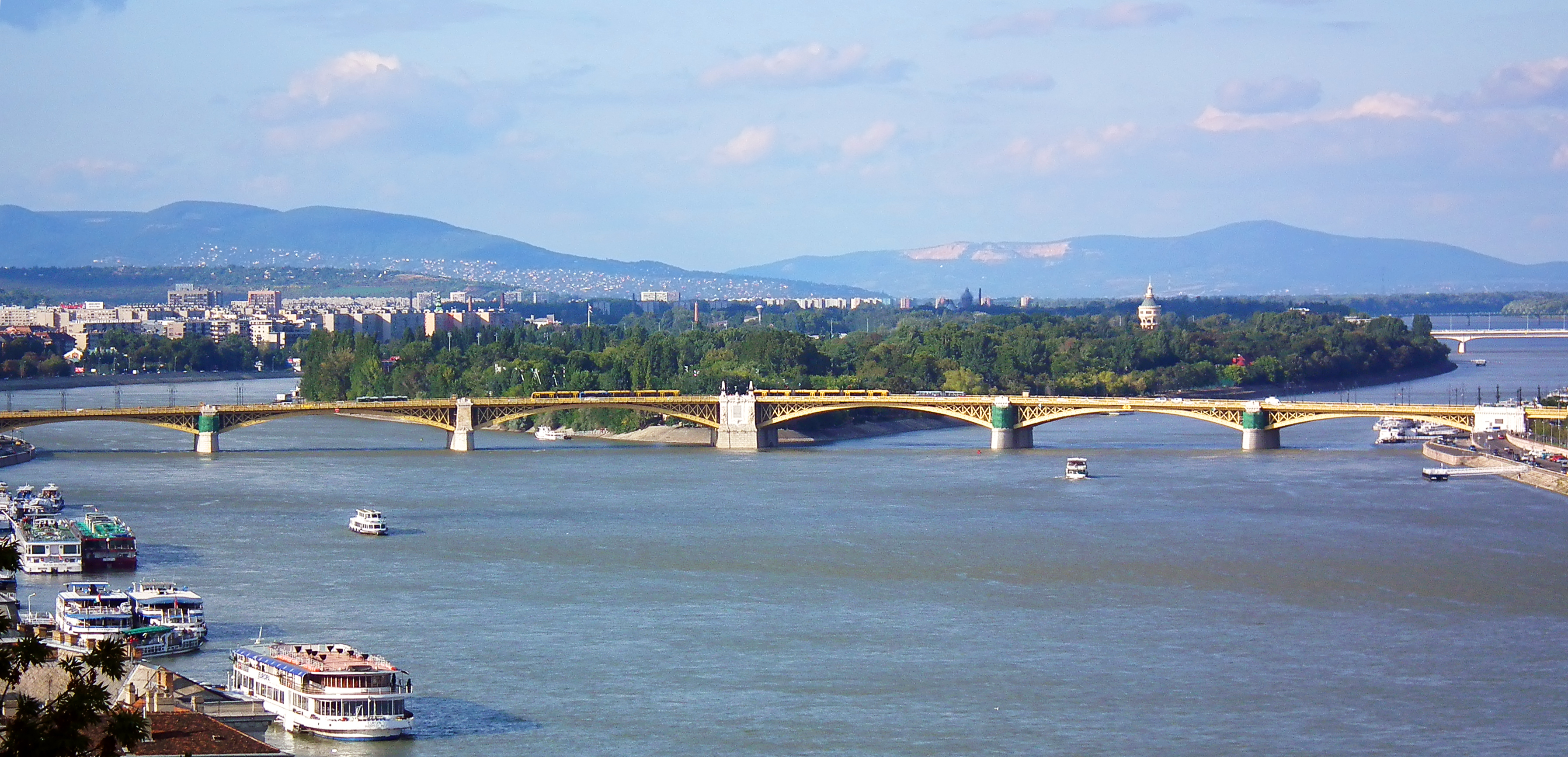 Margit híd This is a photo of a monument in Hungary. Identifier: 524